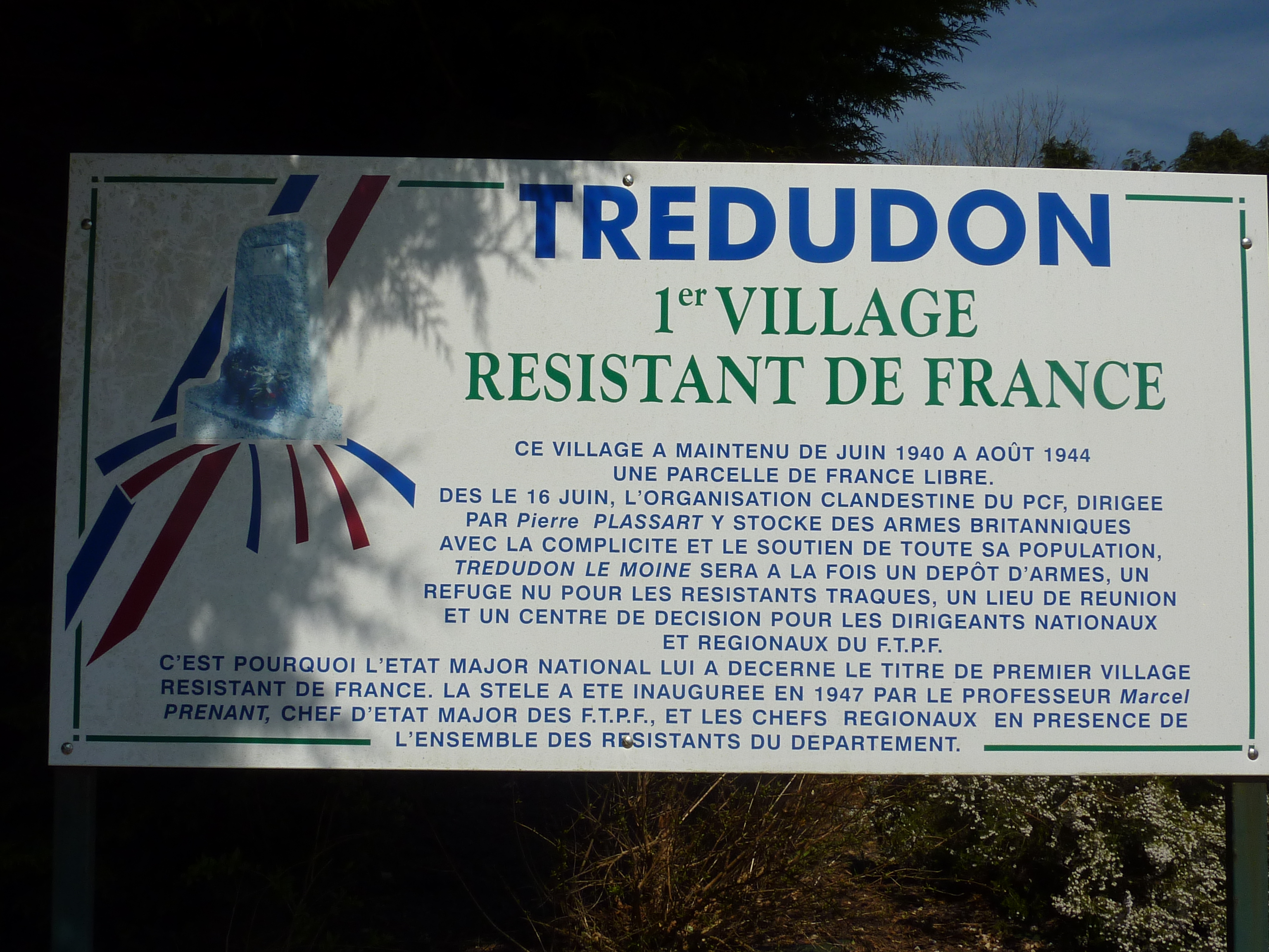 Panneau à proximité de la stèle de la Résistance à Trédudon-le-Moine en Berrien